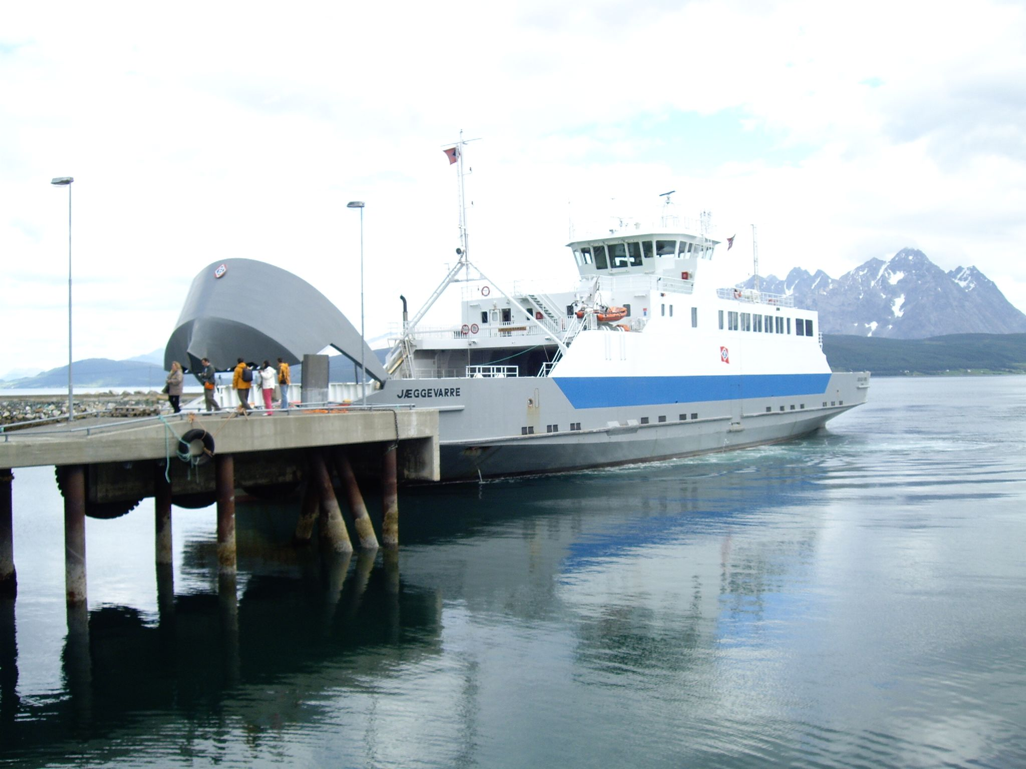 The ferry Jæggevarre approaches harbour. Breivikeidet in Tromsø kommune, Norway.